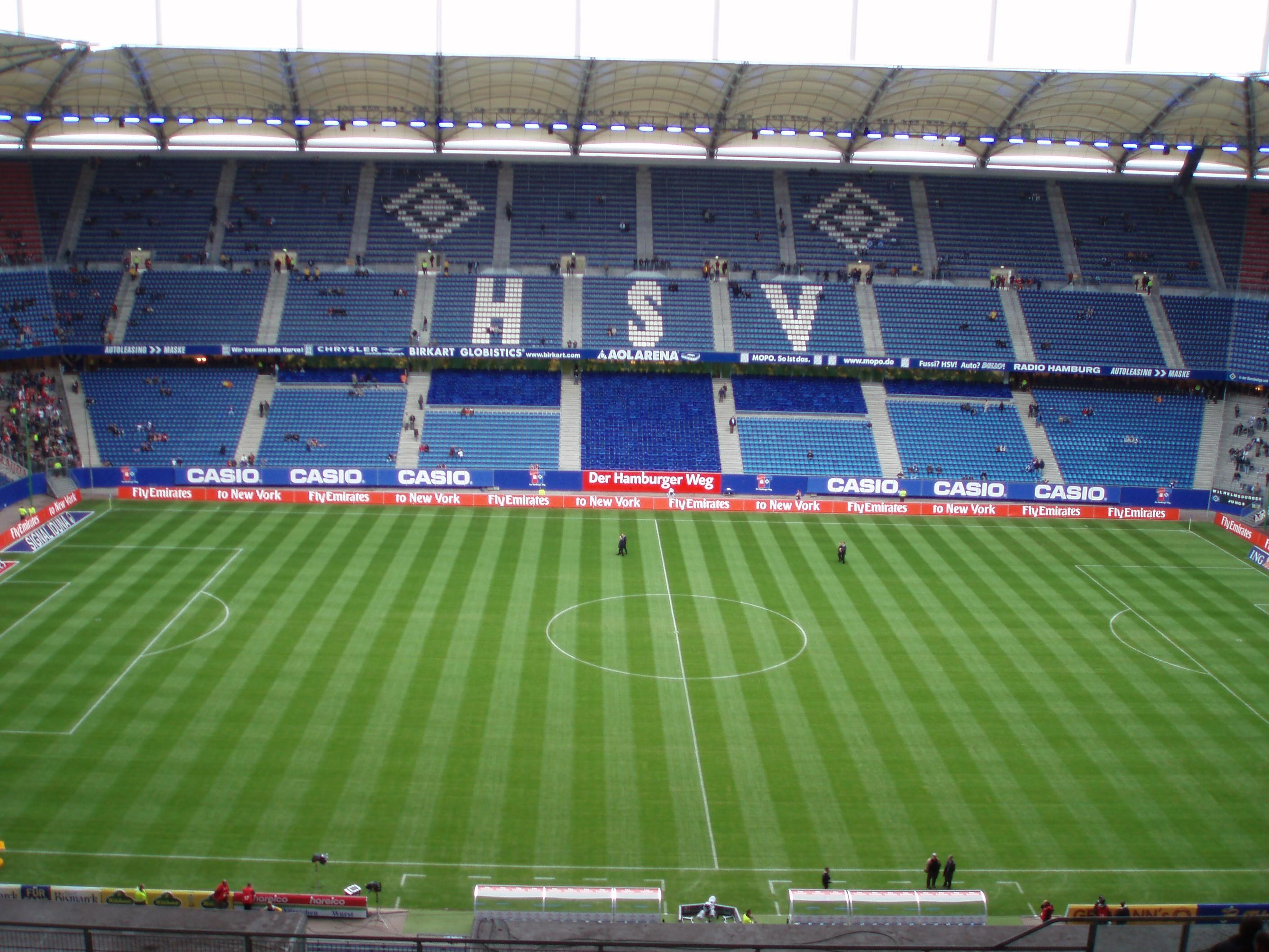 AOL-Arena (Farben umgekehrt)